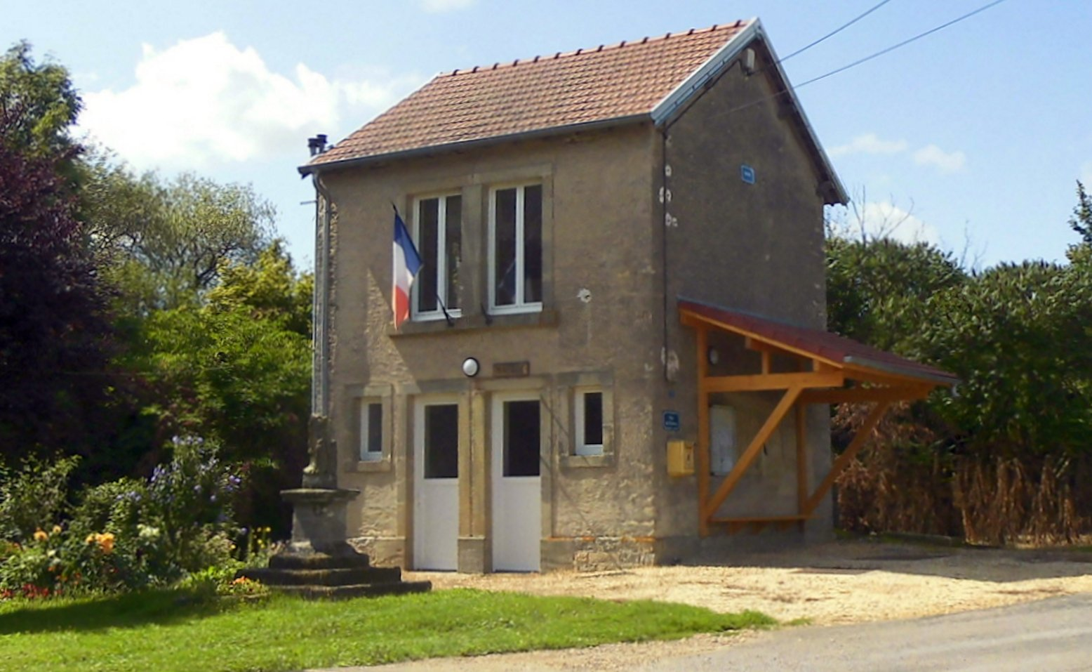 La mairie de Ranzevelle